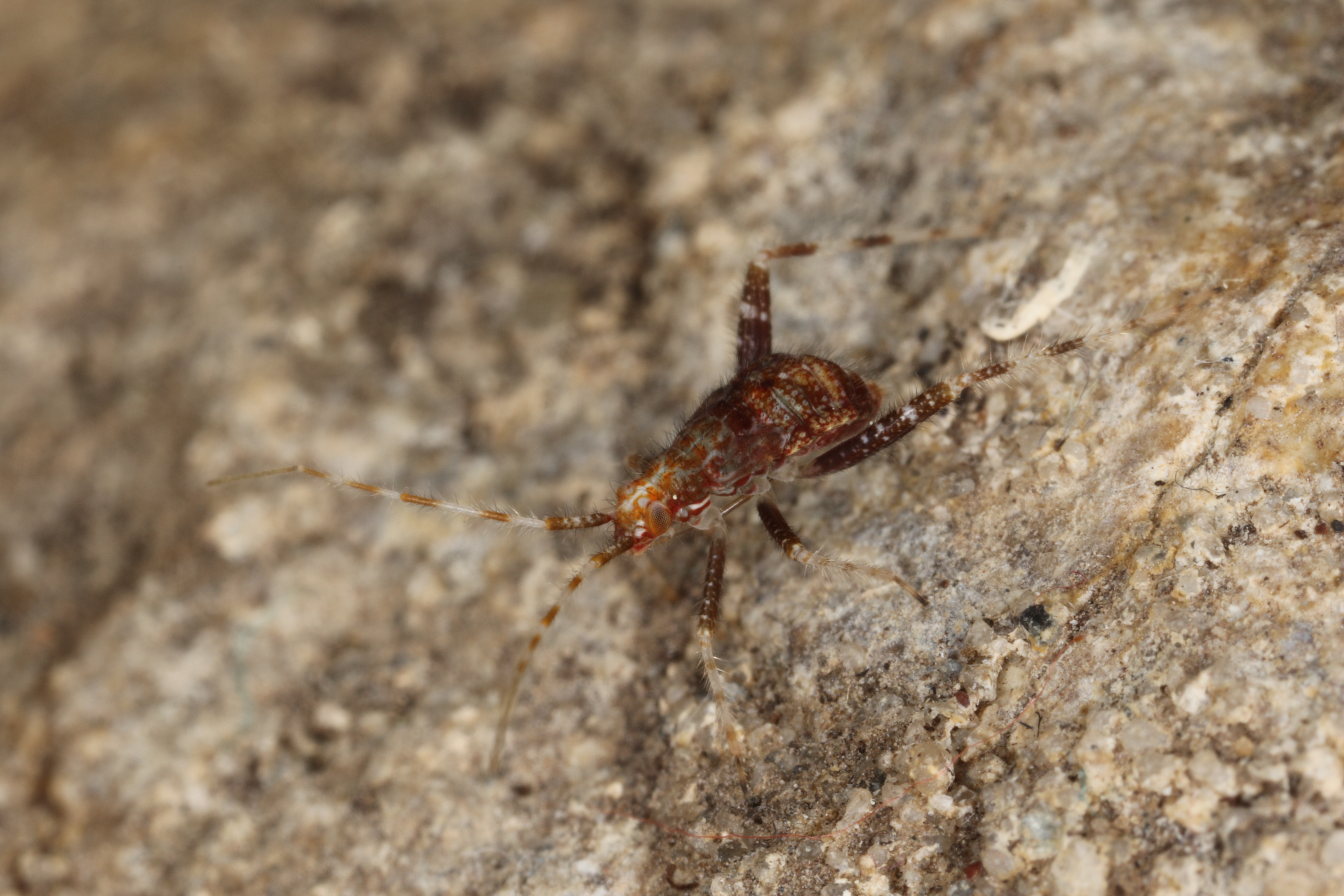 Phytocoris ulmi (Linnaeus, 1758), Søborg, Denmark, 3 June 2016